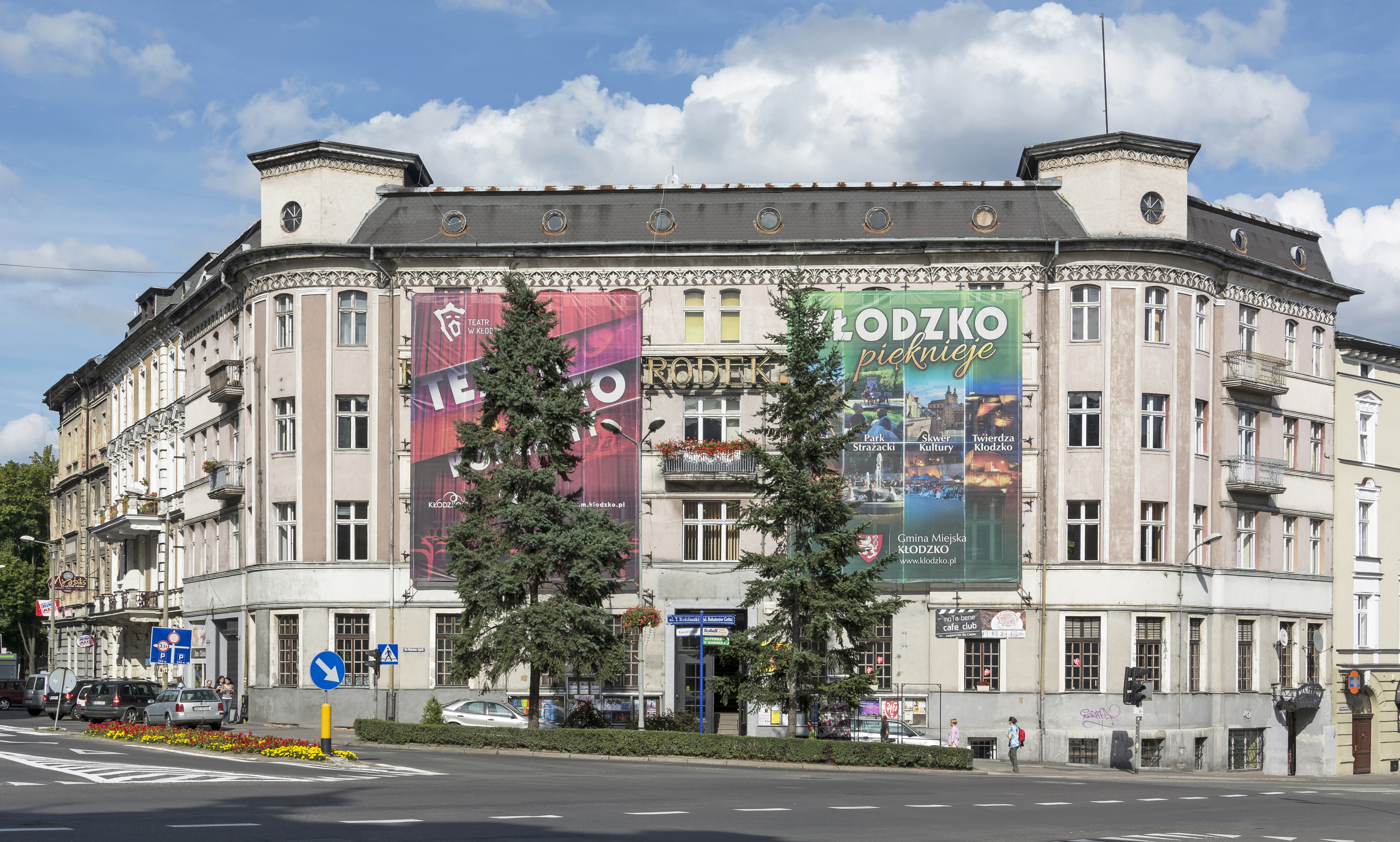 Kłodzko, historyczny układ urbanistyczny - ośrodek historyczny miasta Kłodzko z zachowanymi niekompletnie miejskimi murami obronnymi wraz ze średniowiecznym mostem i wyspą Piasek